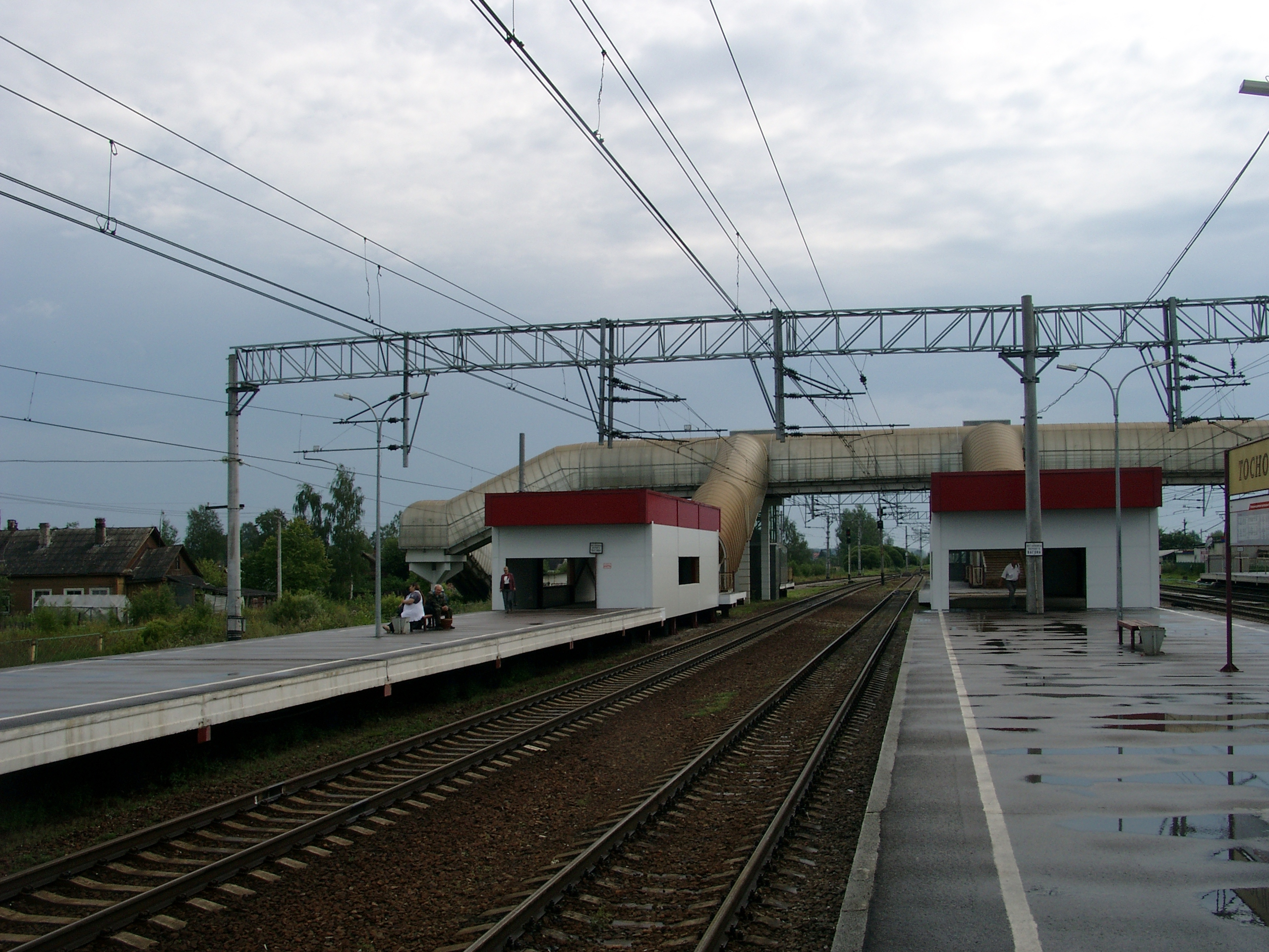 Железнодорожная станция Тосно, Ленинградская область, Россия. Вид в юго-восточном направлении, в сторону станции Ушаки. Пешеходный переход над путями.